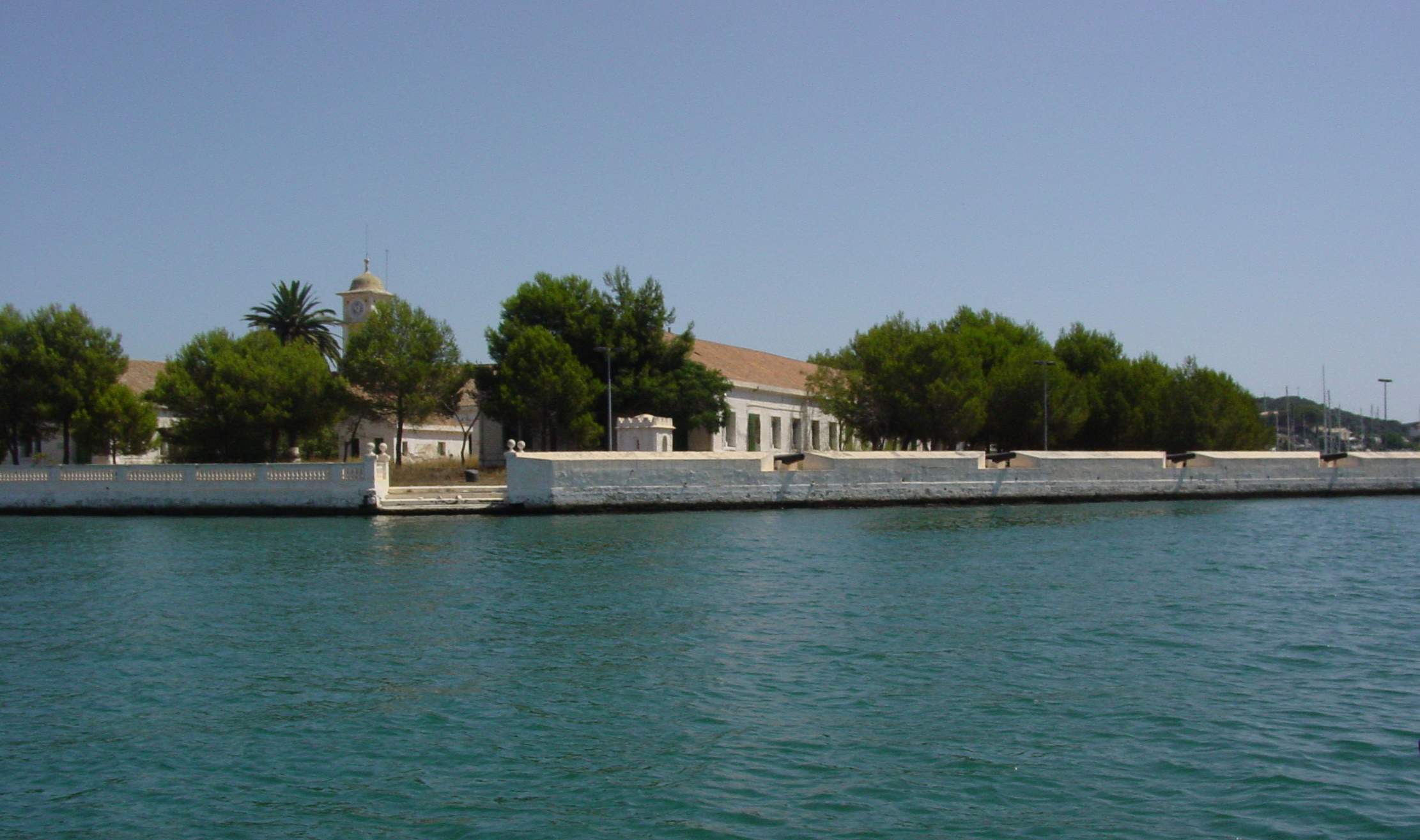 Illa Pinto - Base Naval, Port of Maó, Menorca